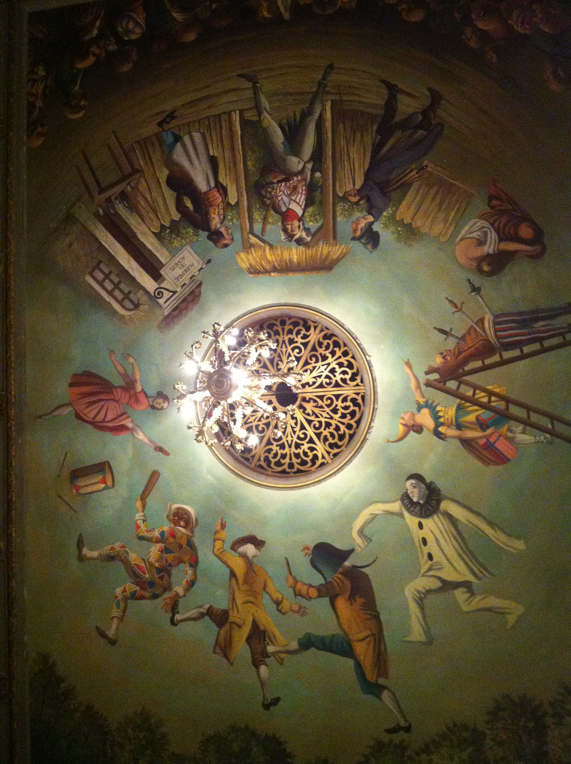 Plafond peint